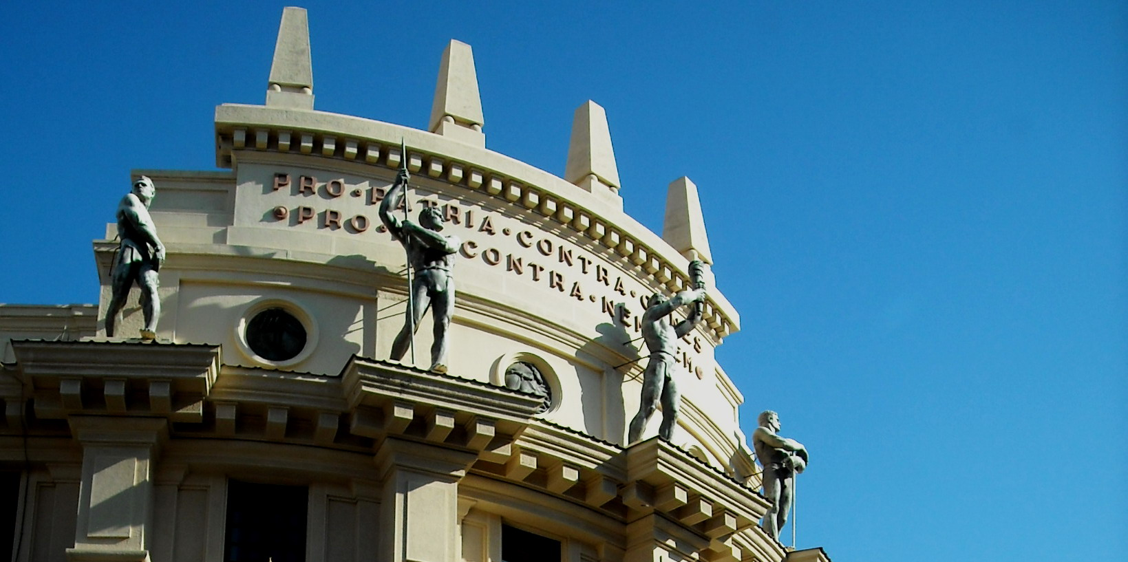 Edificio della Legione dei Carabinieri di Cagliari